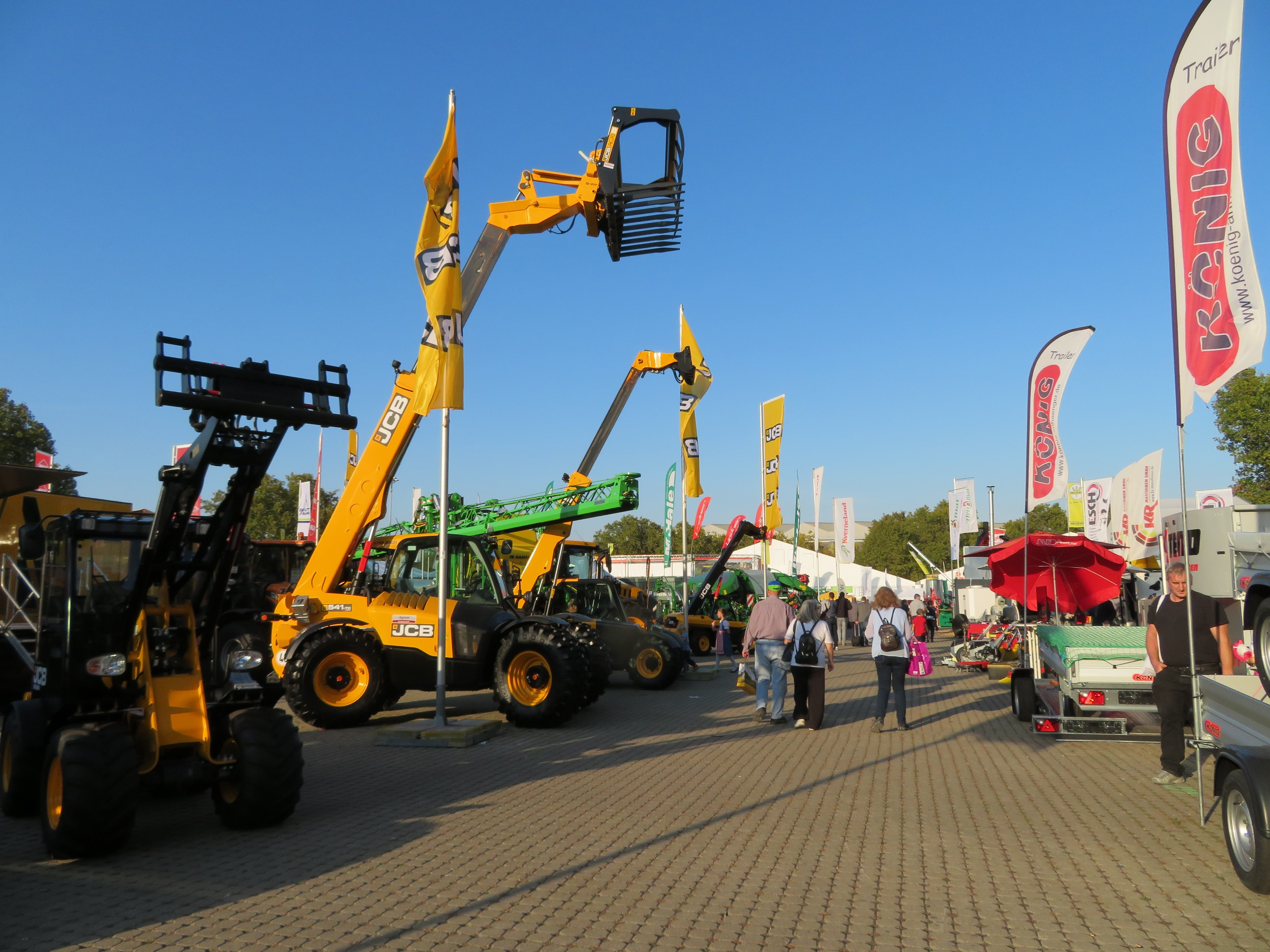 auf dem Landwirtschaftlichen Hauptfest 2018